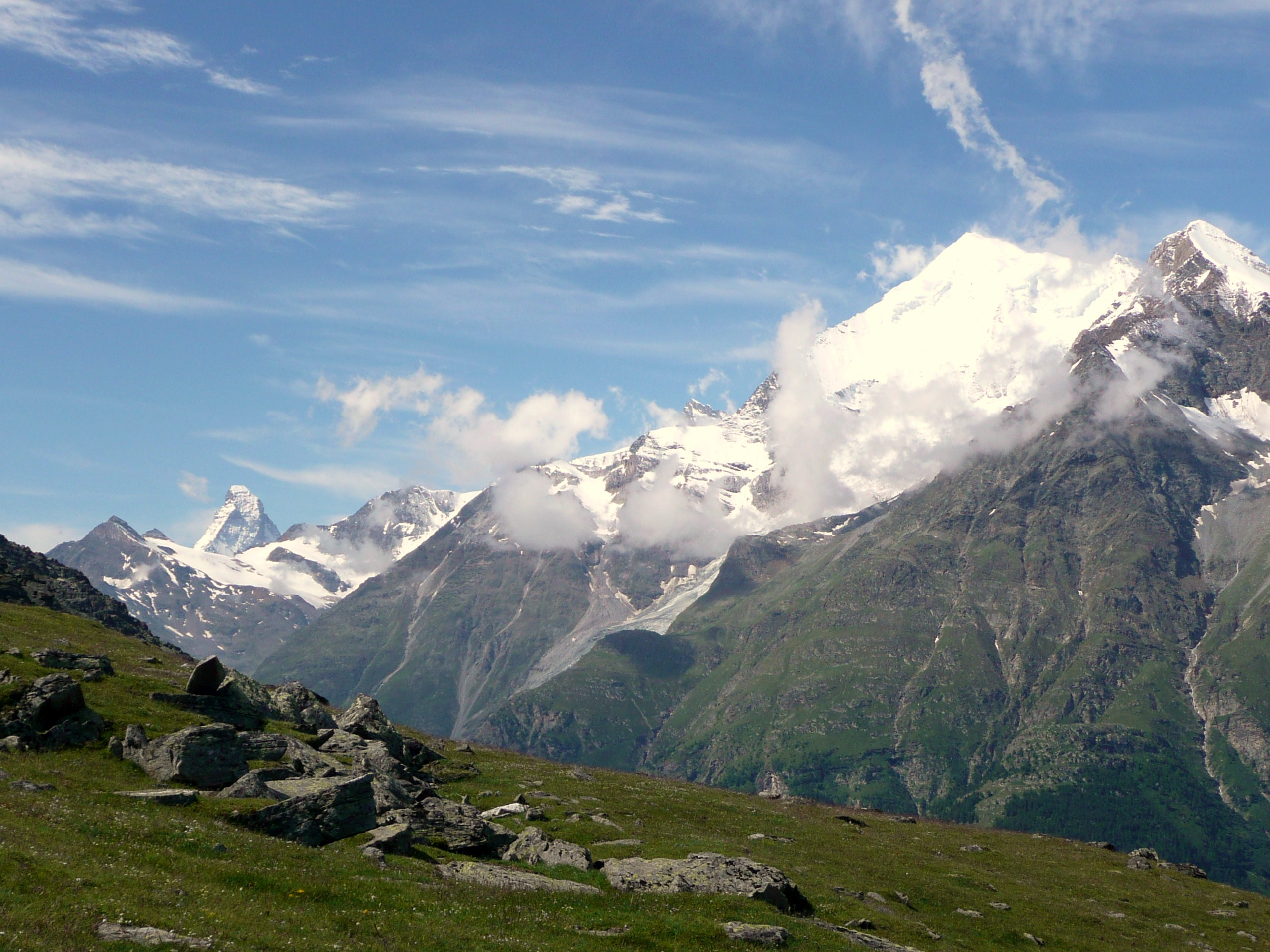 Europaweg